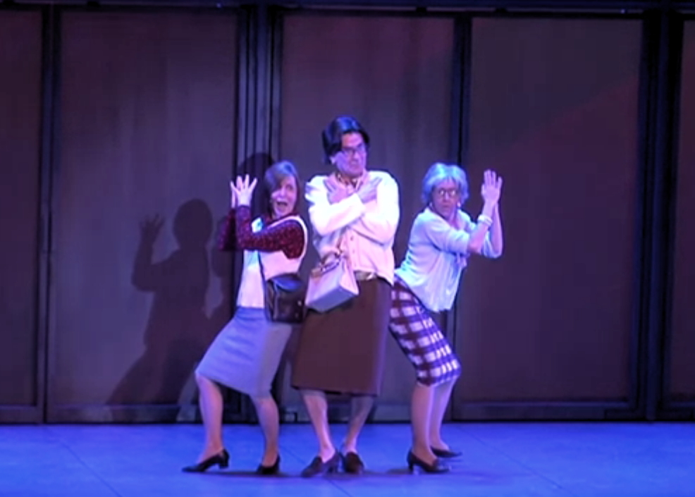 ‘Polònia. El musical' a l’Atrium Viladecans, 13 de maig 2015.